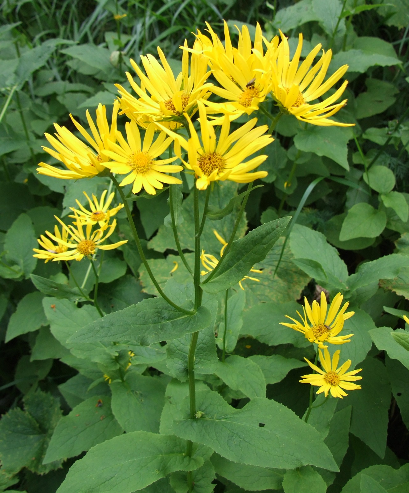 Doronicum austriacum (pl. omieg górski)